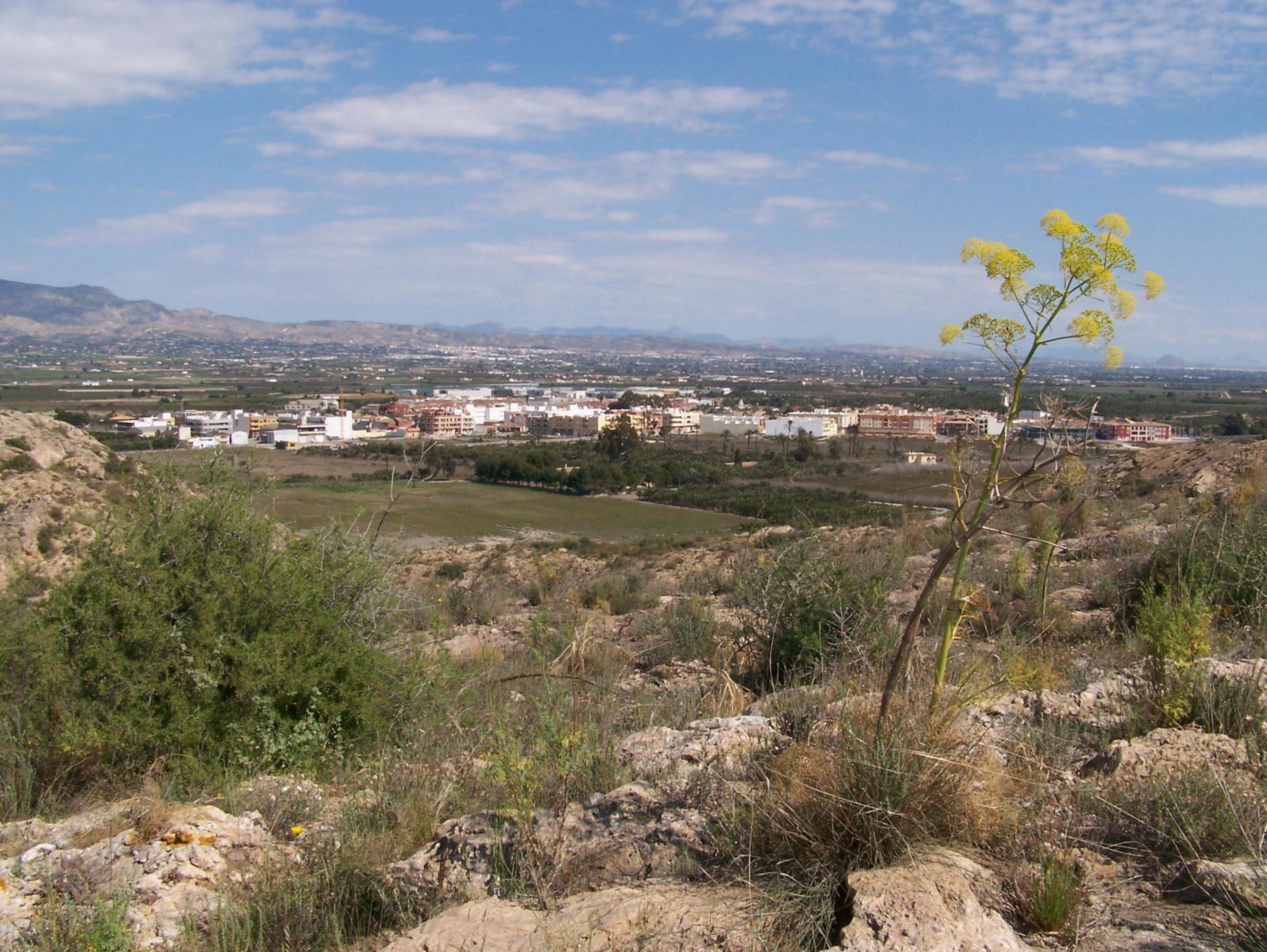 San Isidro de Albatera (San Isidro desde 1993) (Alicante, España), desde el Cabezo de los Ojales/de las Fuentes.